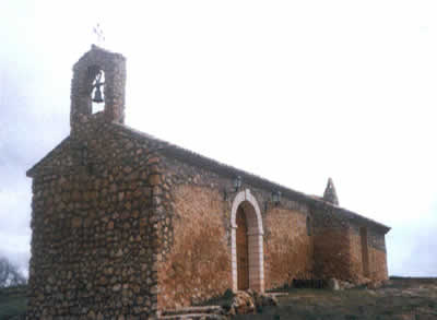 Ermita de Santa Bárbara, Minglanilla (Cuenca)